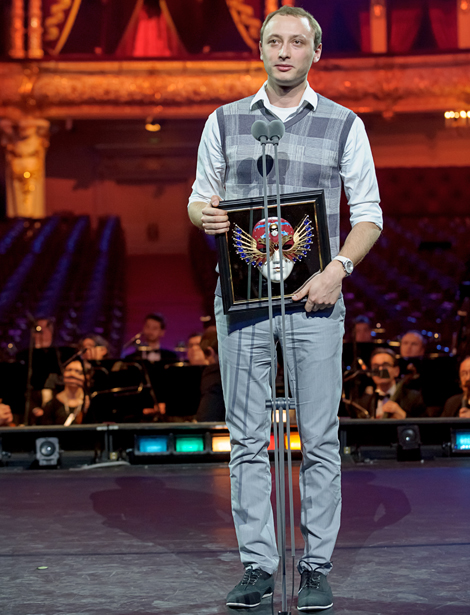 Тимофей Кулябин Фотограф Дмитрий Дубинский 2014